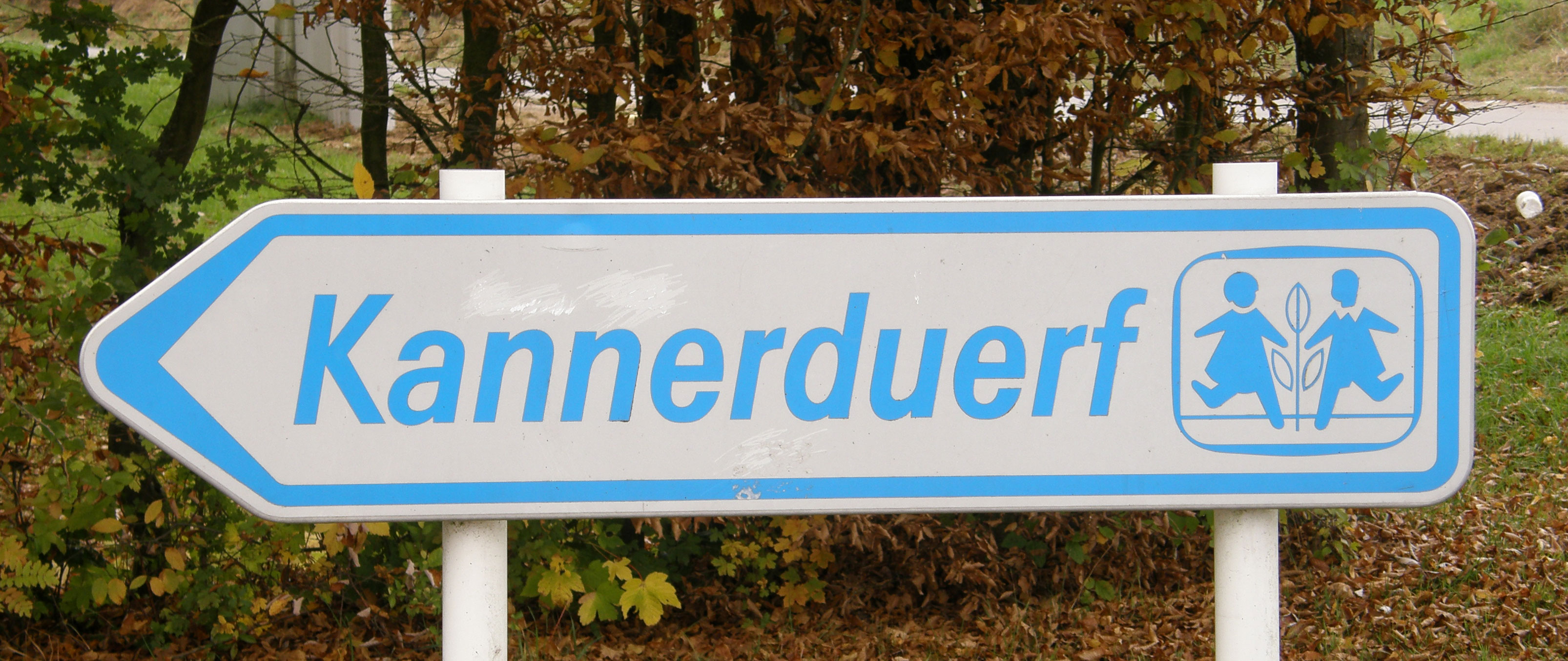 Kannerduerf-Miersch-Schëld